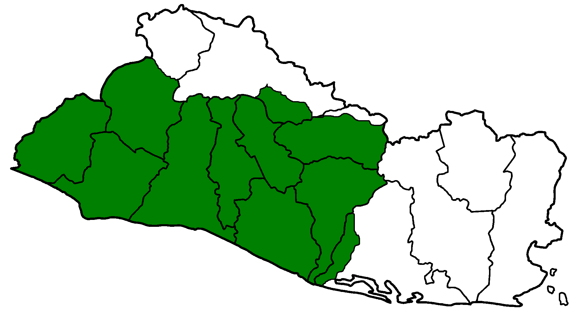 Este archivo fue creado copiando de wikicommons Image:El_Salvador_departments_blank.png y luego editado en el programa paint. fue hecho por y a la hora--Juan Miguel 17:06 16 jul 2006 (CEST) Esta imagén muestra el territorio del Señorío de Cuzcatlán desde aprox 1400 hasta la conquista española.